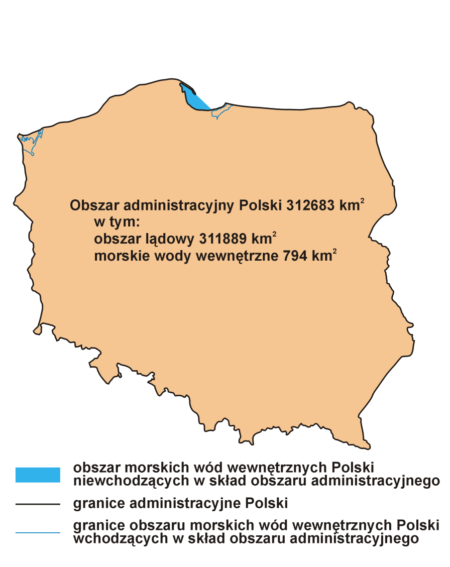 Mapa terytorium administracyjnego Polski w 2006 roku. Autor: Aotearoa